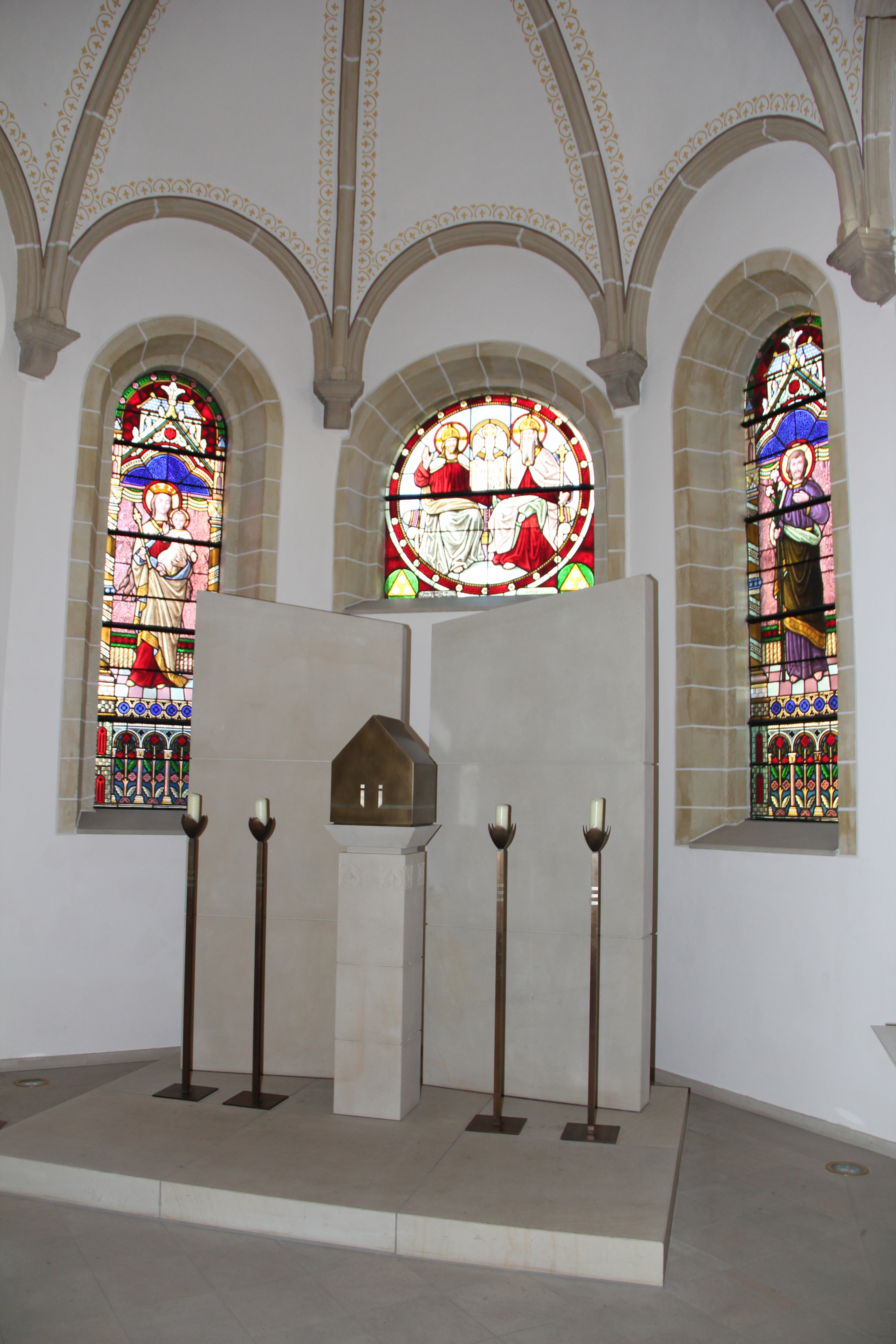 Chorraum der St. Antoniuskirche in Engden